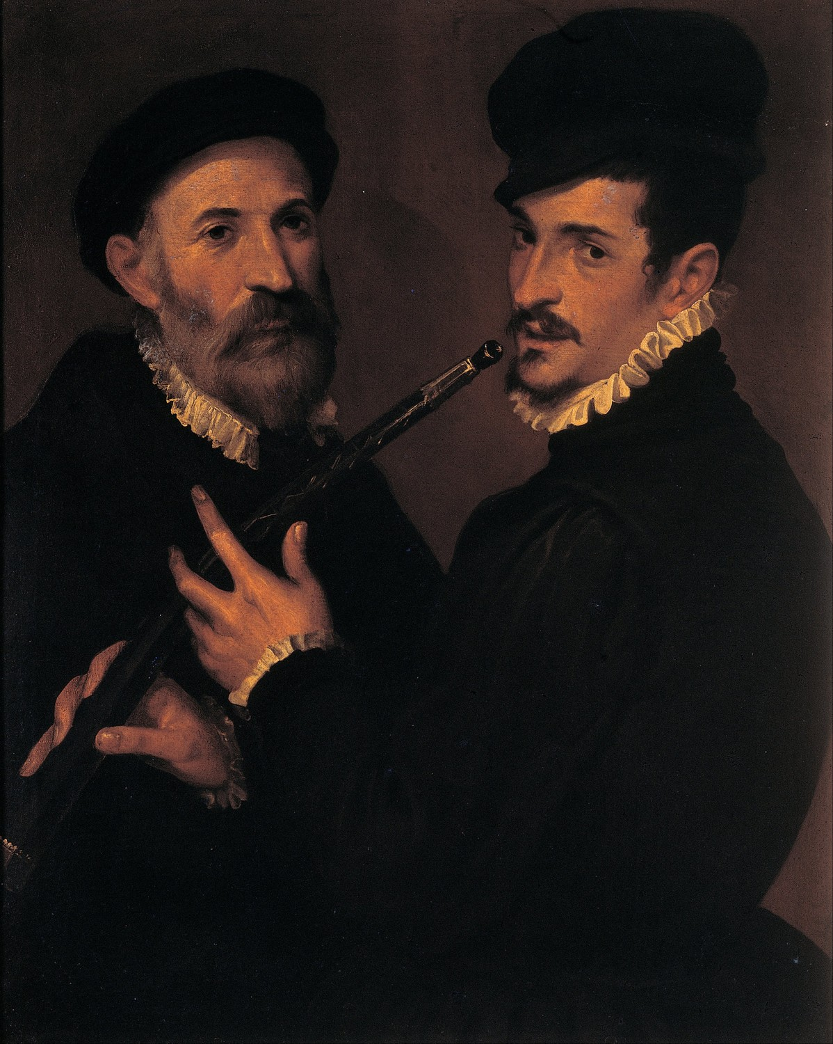 Doppio ritratto con suonatore di cornetto